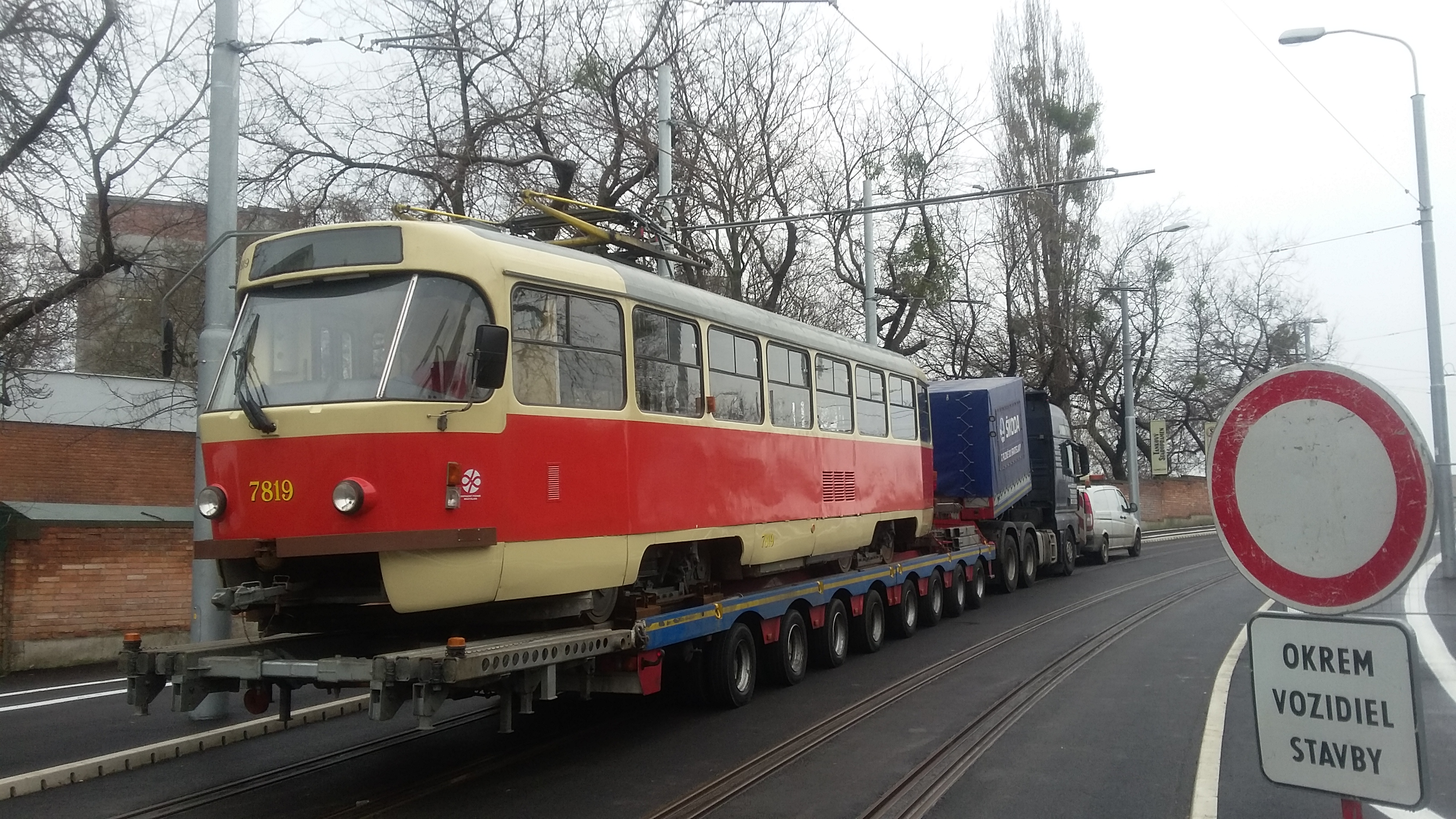 Električka Tatra T3 ev. č. 7819 špeciálne upravená s 1435 milimetrovými podvozkami z dôvodu skúšok normálneho rozchodu električkovej trate do Petržalky (18. februára 2016).